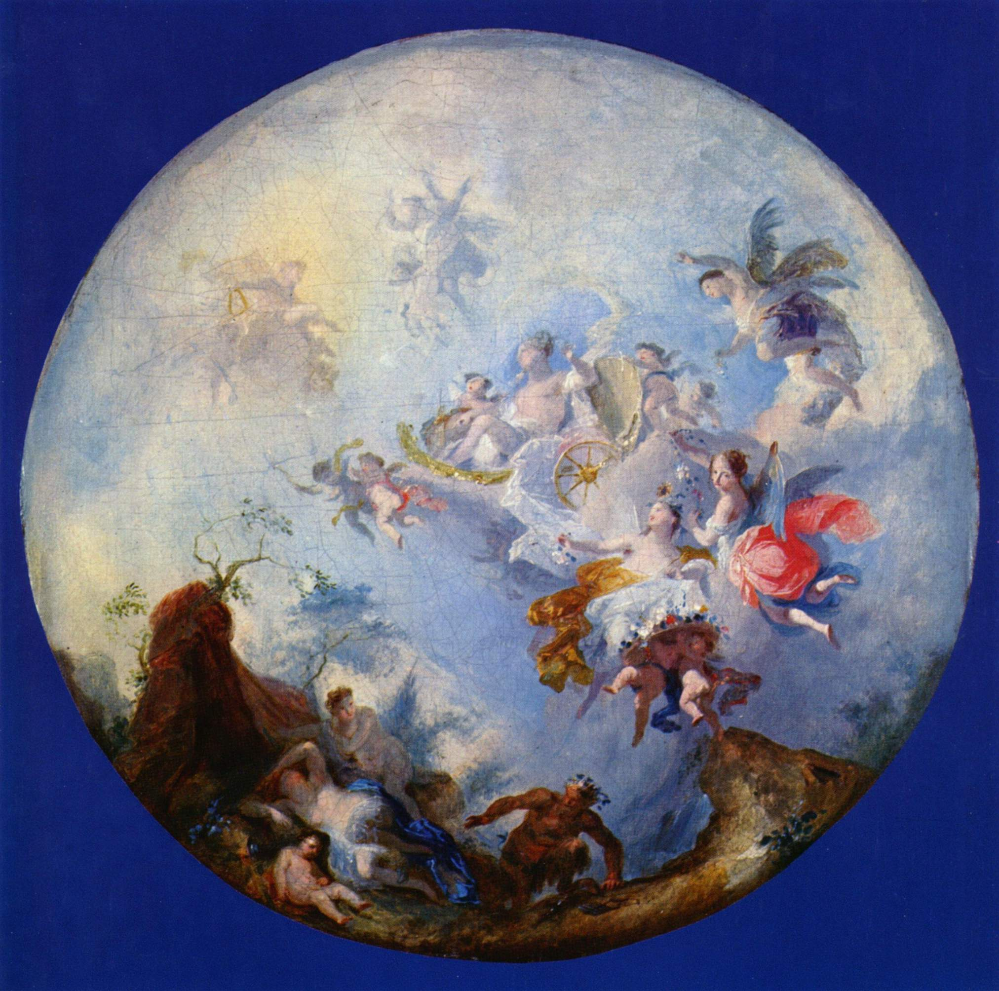 (Entwurf für ein Kuppelfresko)